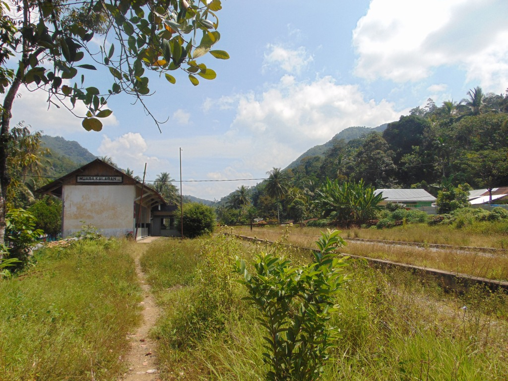 Stasiun Murao Kalaban